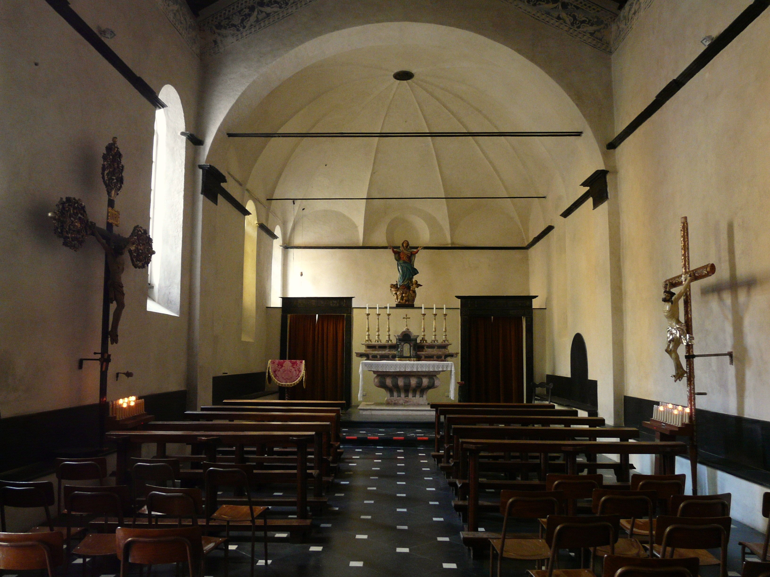 Navata centrale dell'oratorio di Nostra Signora Assunta, Portofino, Liguria, Italia